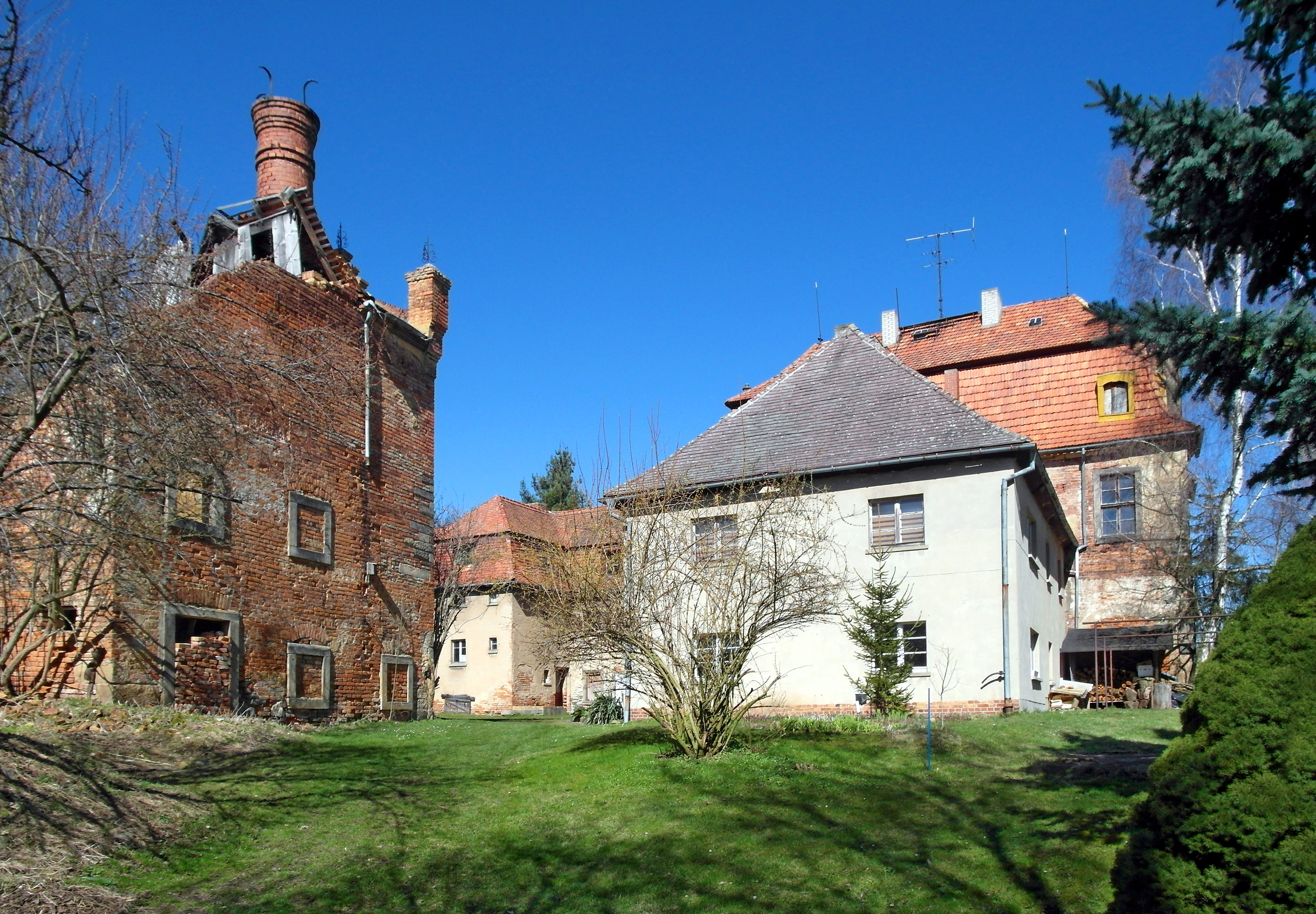 27.03.2017 02763 Hörnitz (Bertsdorf-Hörnitz) Zittauer Straße 21: Schloß Neu-Hörnitz (18. Jh.). Ab 1867 bis in die DDR-Zeit als Brauerei genutzt. Heute Privatbesitz, Leerstand. Ansicht aus dem Park von Süden. [SAM8927.JPG]20170327265DR.JPG(c)Blobelt